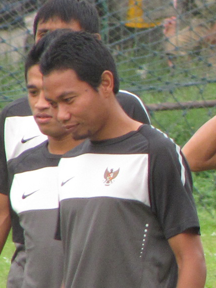 Muhammad Ridwan